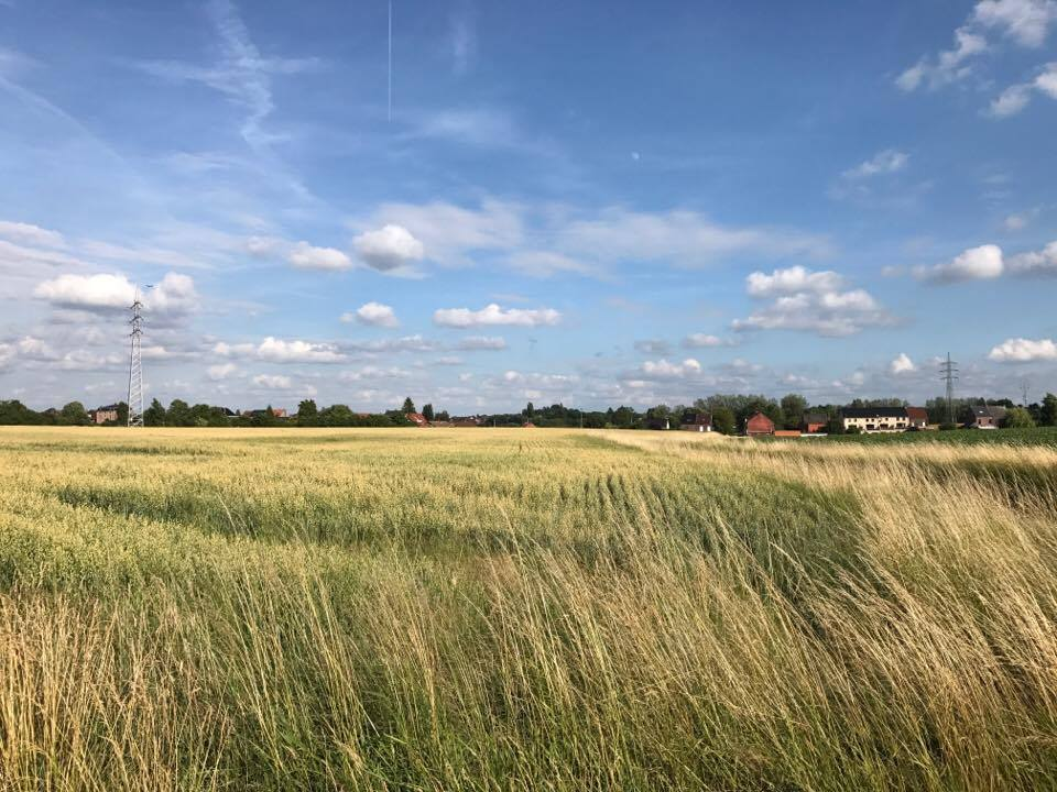 Paysage